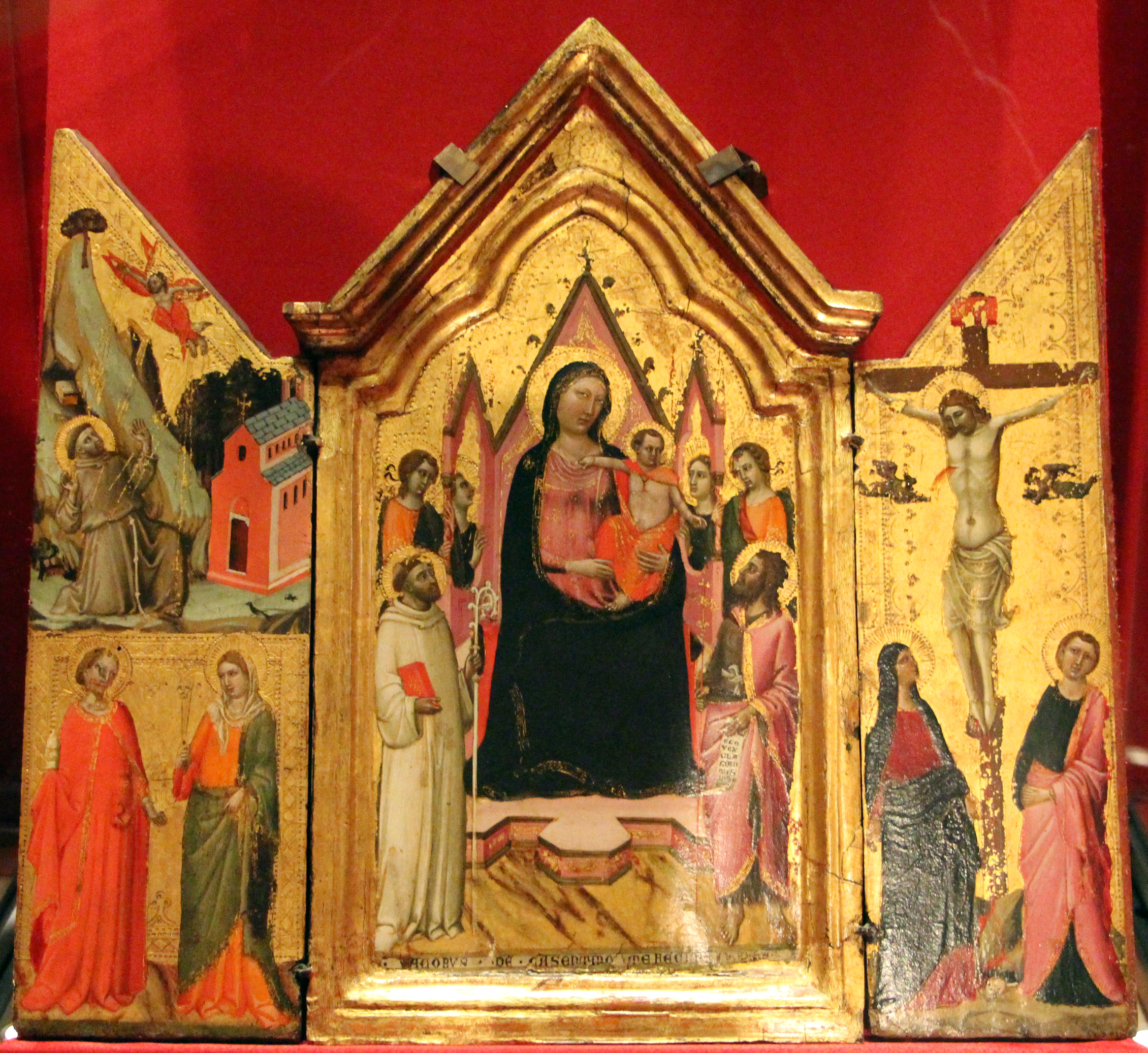 'Jacopo del Casentino', mostra a Pratovecchio, 2014